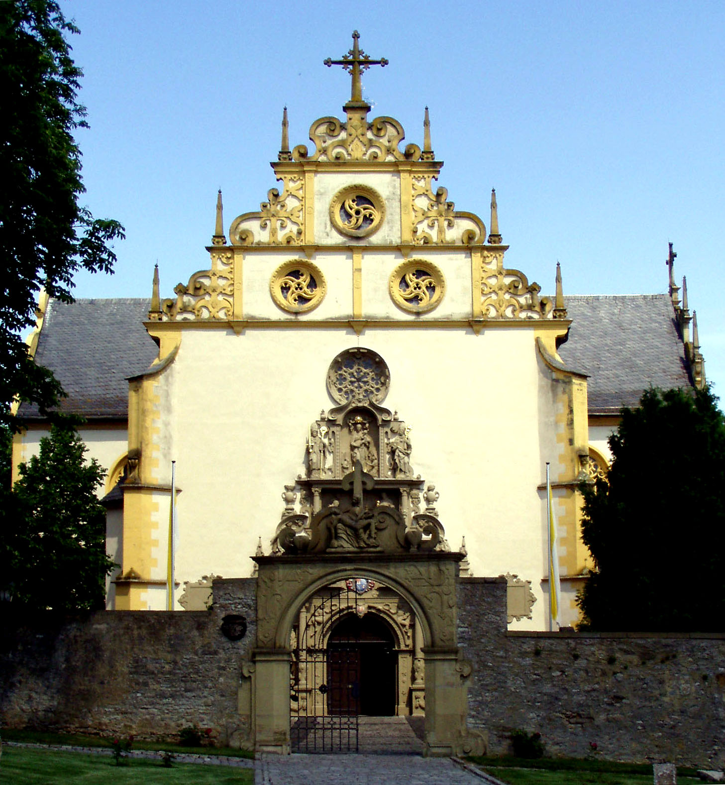 Wallfahrtskirche 'Maria im Sand' in Dettelbach / Unterfranken